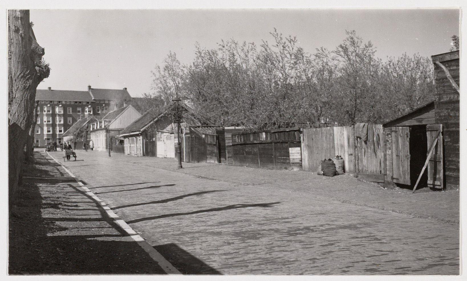 Beschrijving Spijtellaantje In noordelijke richting gezien naar Sloterweg Documenttype foto Vervaardiger Eck, J. van (Jacobus, 1873-1946) Collectie Collectie J. van Eck: foto's Datering 13 mei 1939 Geografische naam Sloterweg Spijtellaantje Inventarissen Afbeeldingsbestand A01634001016 Generated with Dememorixer